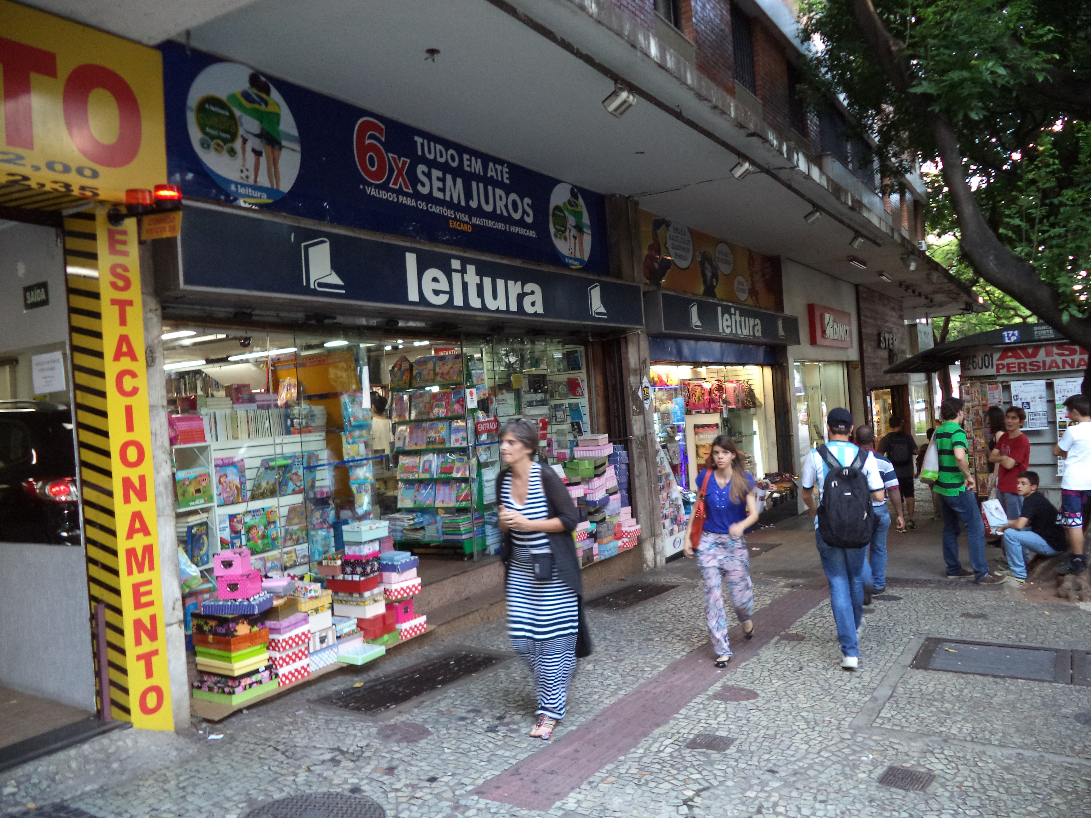 Entrada da Leitura Savassi, em Belo Horizonte.